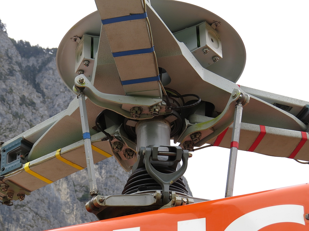 Hauptrotor Airbus Helicopters AS 350 B3